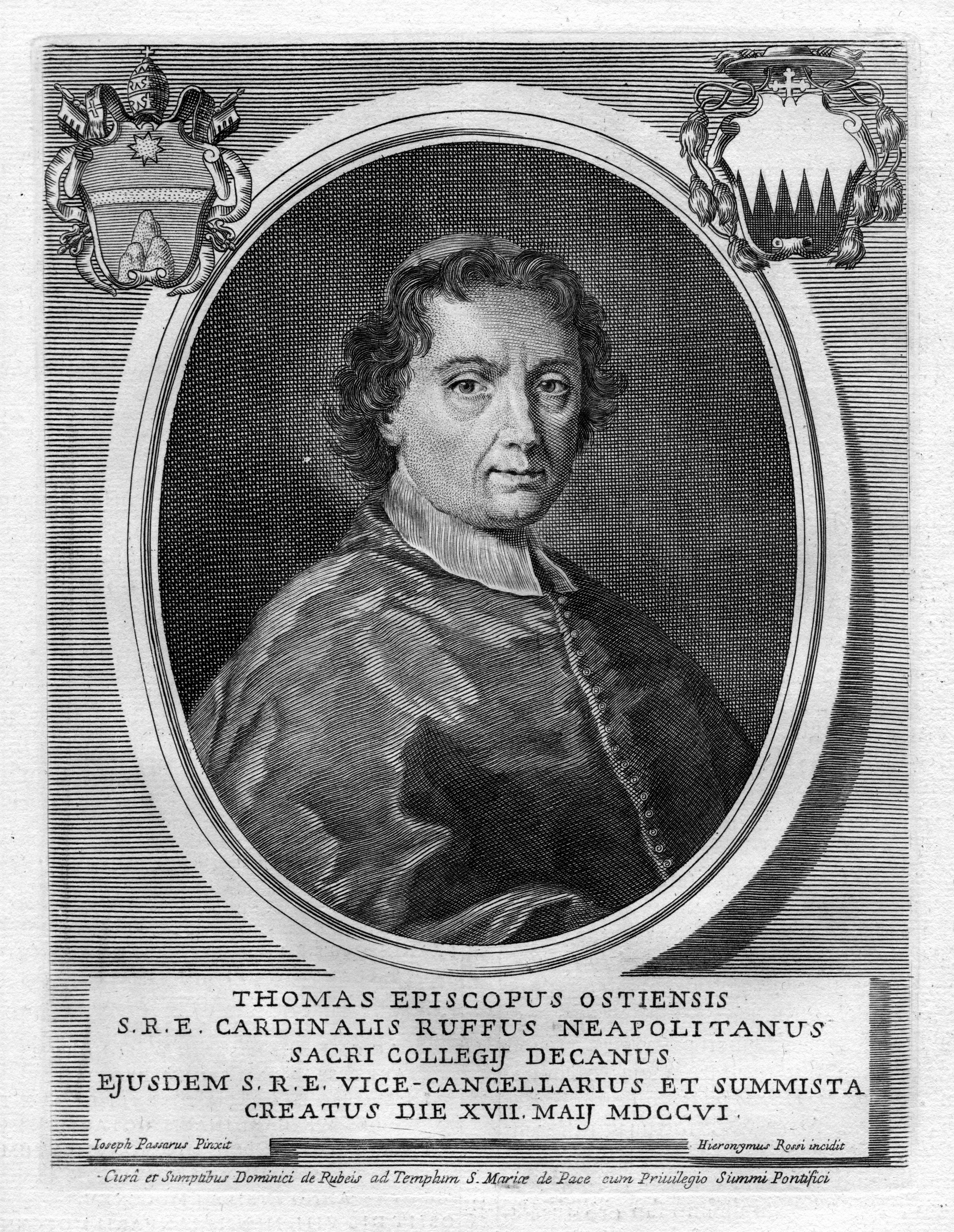 portrait gravé